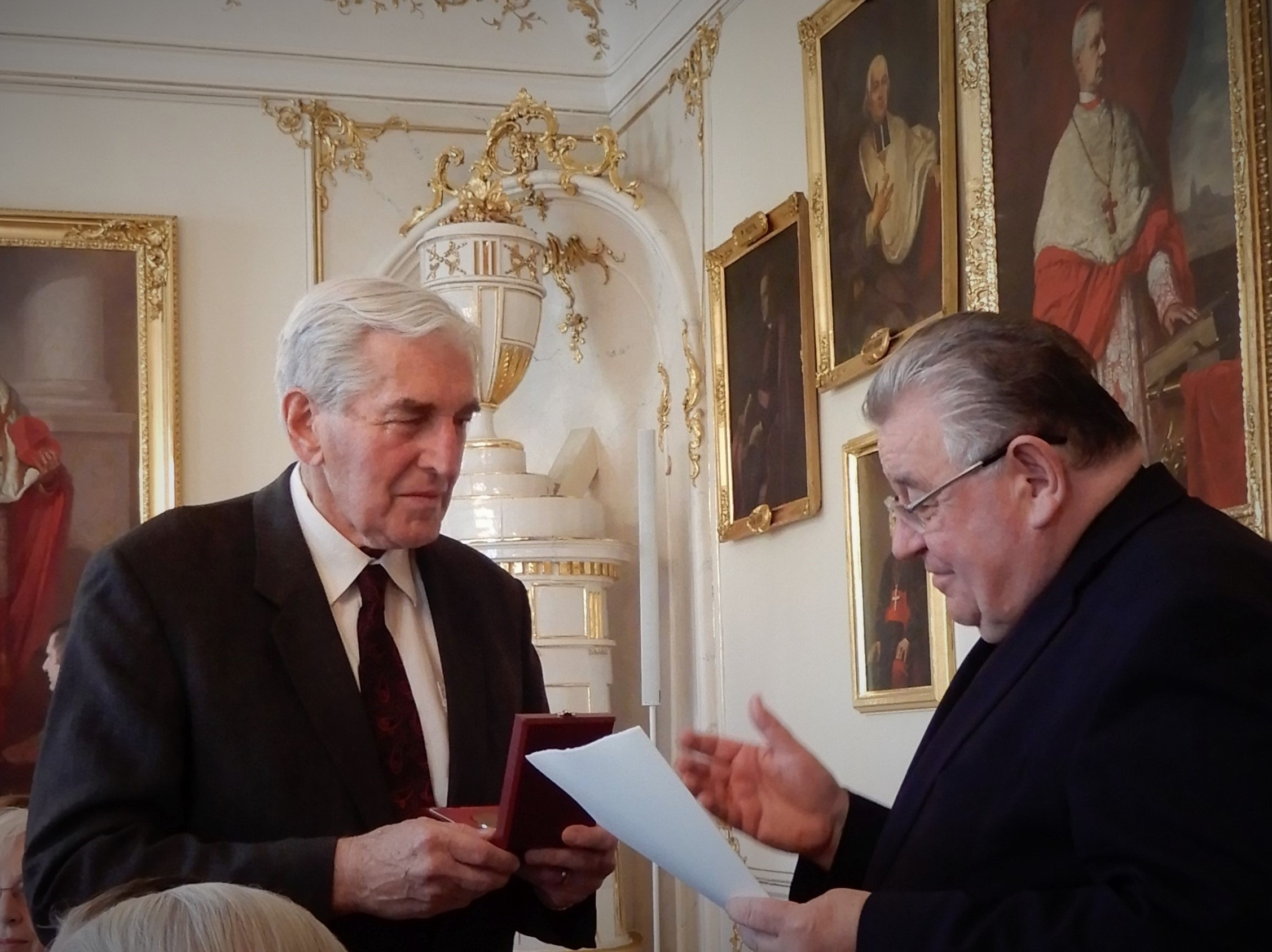 Archeolog Bořivoj Nechvátal dostal 17.6.2020 za celoživotní práci v archeologii Vyšehradu od kardinála D.Duky medaili A. Podlahy